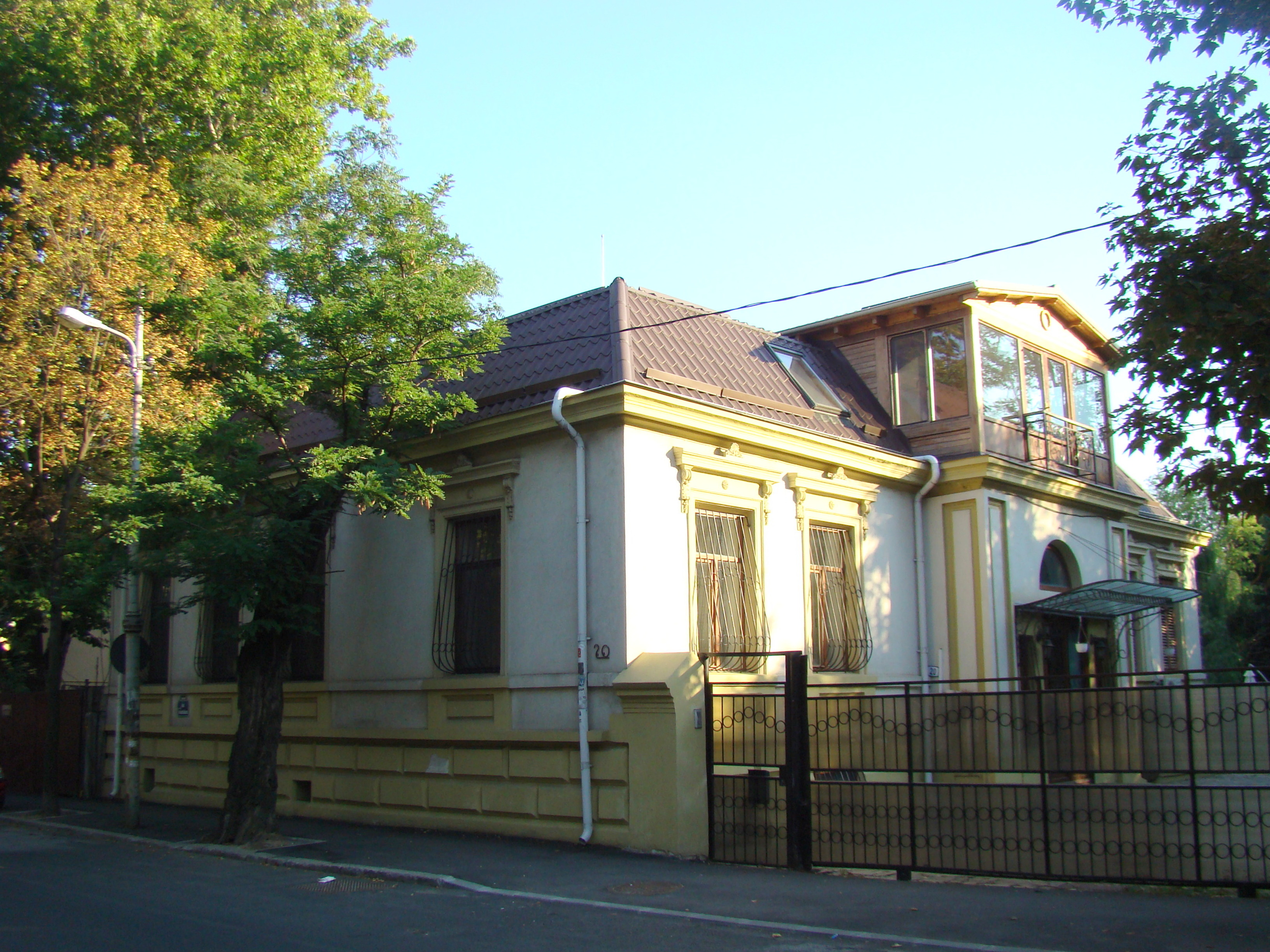 Casă monument istoric, str. Constantin Budișteanu, nr.20